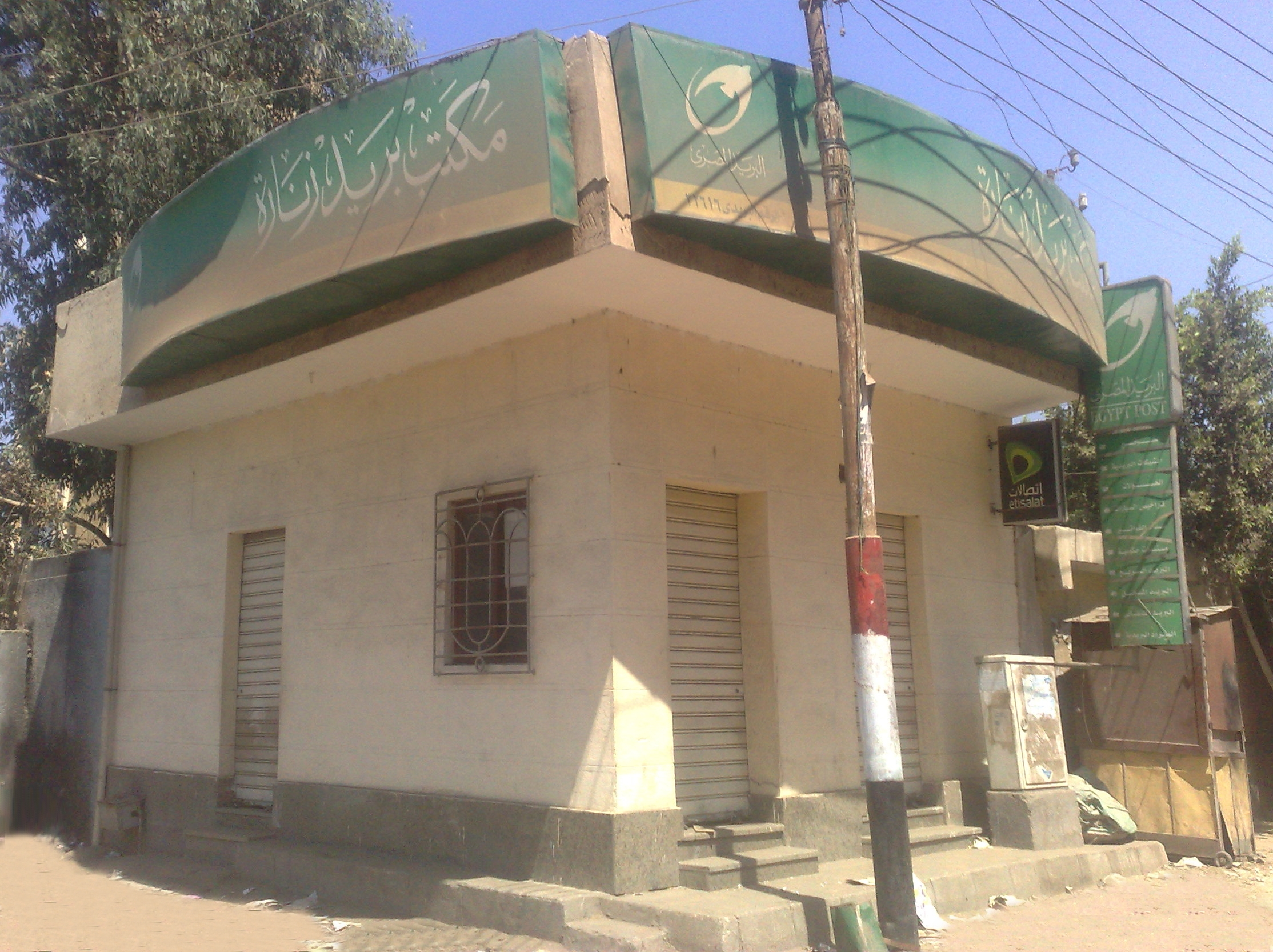 مكتب بريد قرية زنارة، تلا